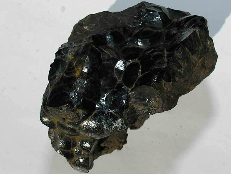 Goethita